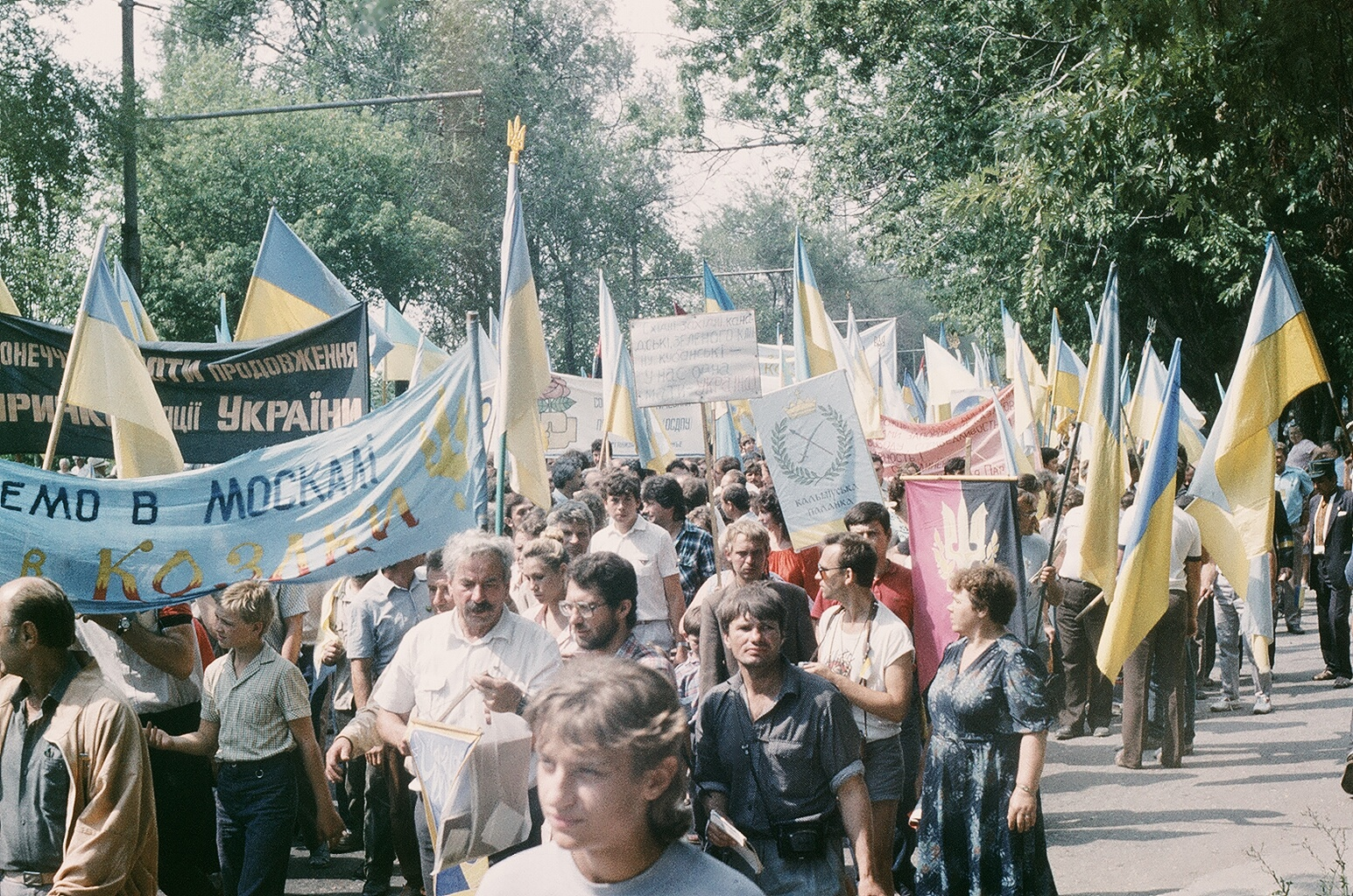 500 років Українському козацтву. 1990.: фото